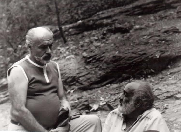 Ալբերտ Յավուրյանը Սերգեյ Փարաջանովի հետ